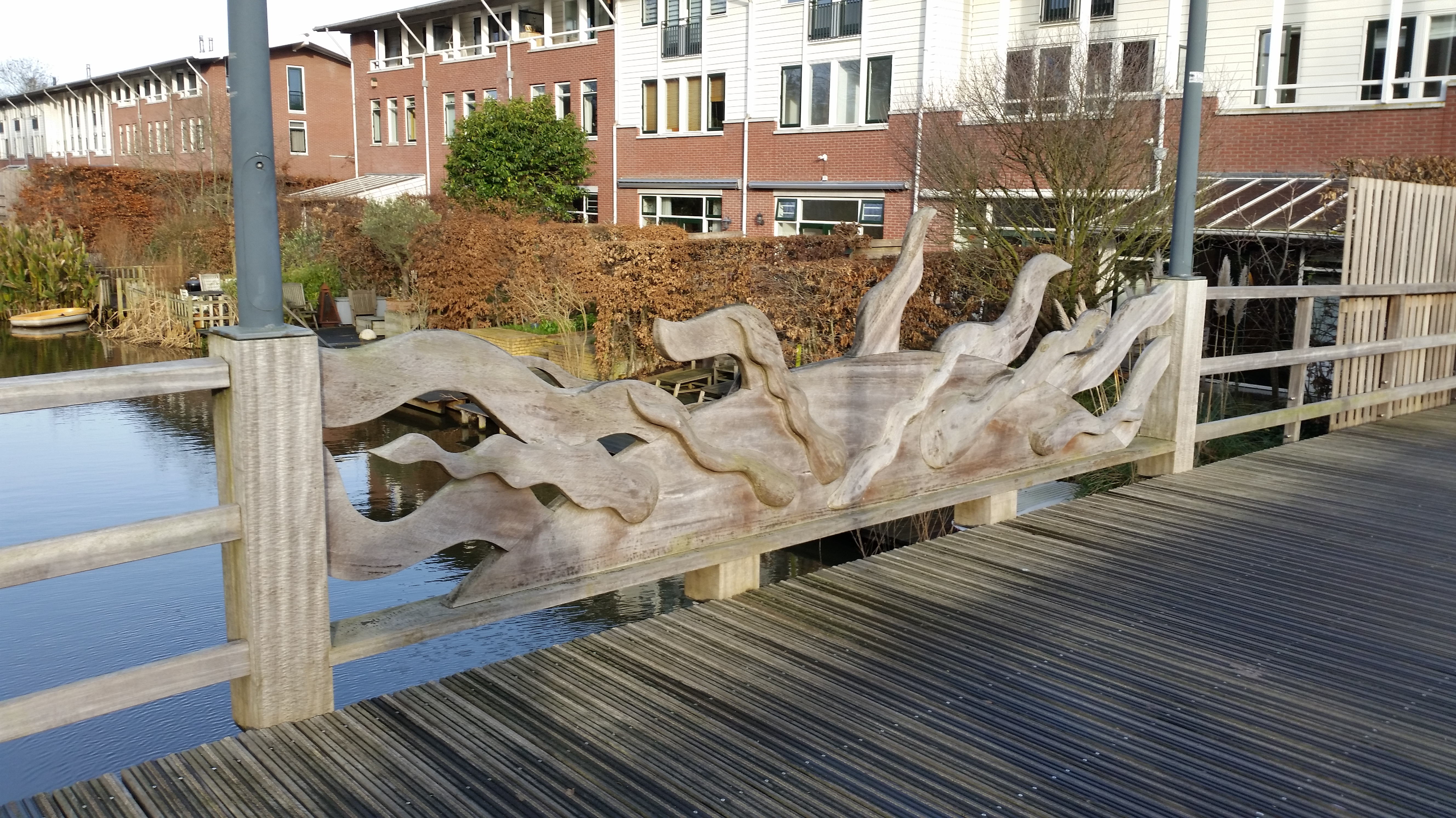 Impressie van de Piet Keizerbrug in de Watergraafsmeer, Park de Meer (januari 2020)